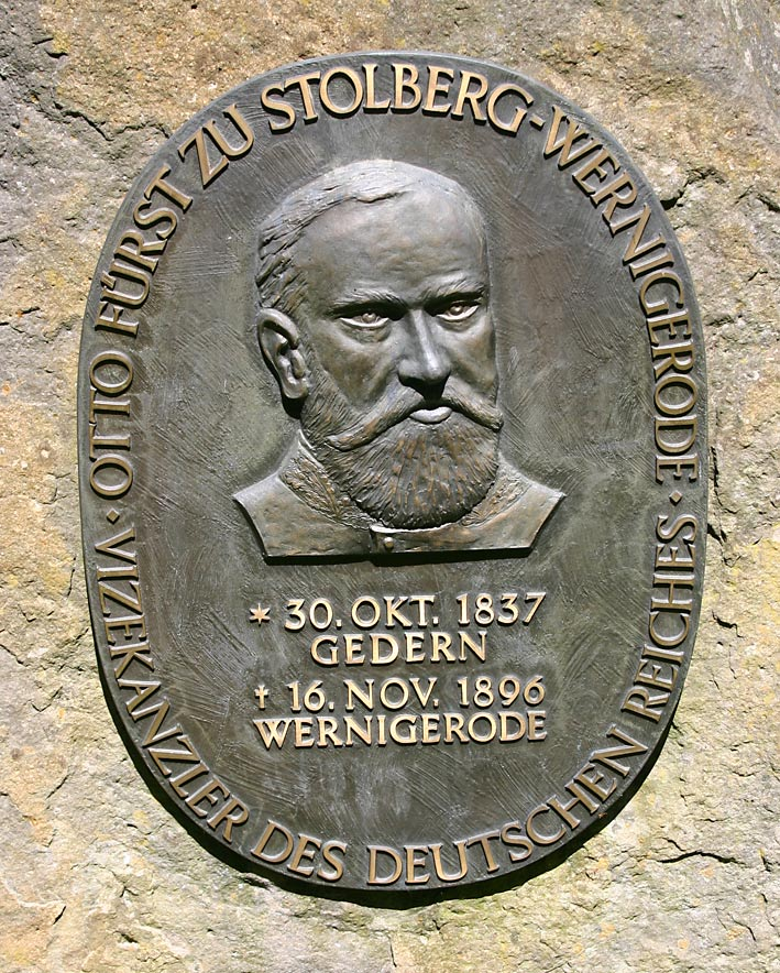 Gedenktafel Otto zu Stolberg-Wernigerodes (* 30. Oktober 1837 in Gedern; † 19. November 1896 auf Schloss Wernigerode) im Gederner Schlosspark mit falschem Sterbedatum.